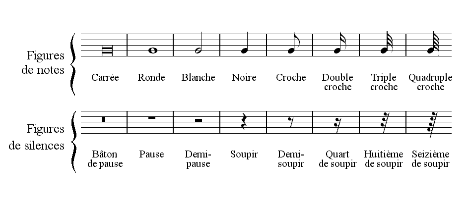 Forme des figures de notes et de silences